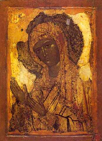 Icon of virgin Mary Agiosoritissa, Moscow Kremlin iconostasis. Икона Божией Матери Халкопратийская (Агиосоритисса) из центрального иконостаса Успенского собора Московского Кремля